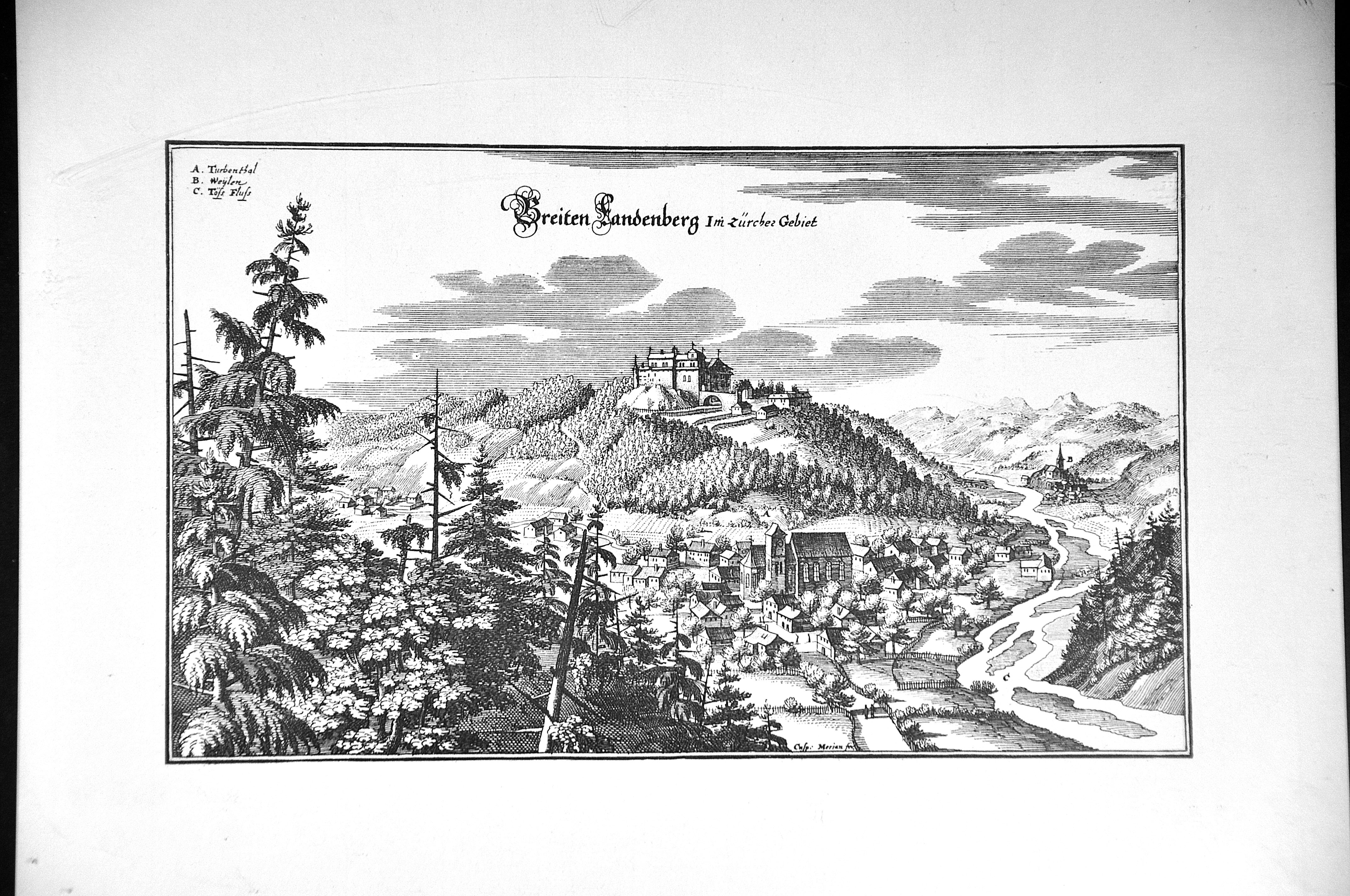 Die Aufnahme aus dem Ortsmuseum Turbenthal zeigt Breitenlandenberg mit Turbenthal und Wila um 1750. Die Burg wurde 1804 abgebrochen.